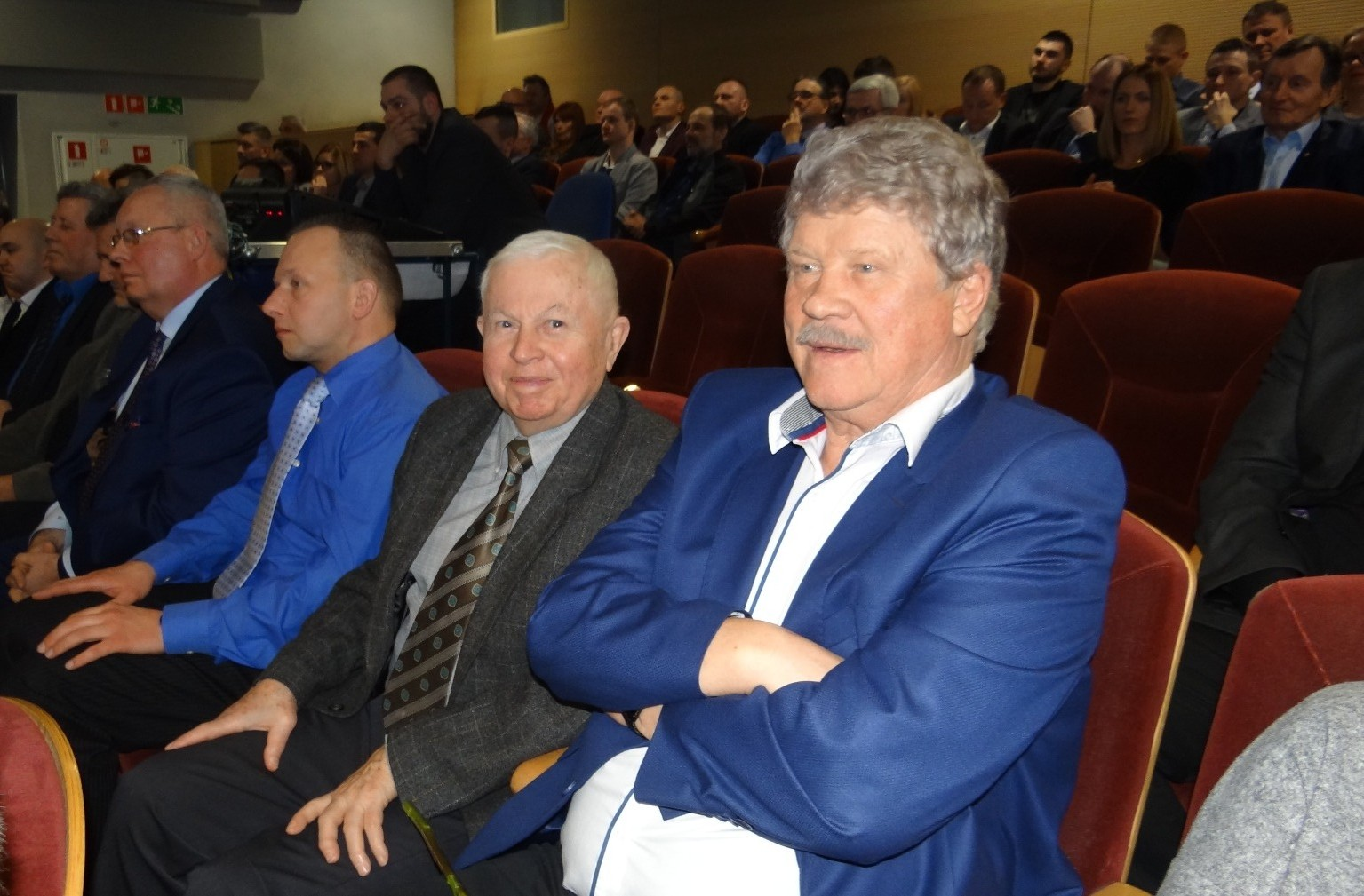 Były zasłużony prezes Spójni Krzysztof Orzechowski (P) podczas gali